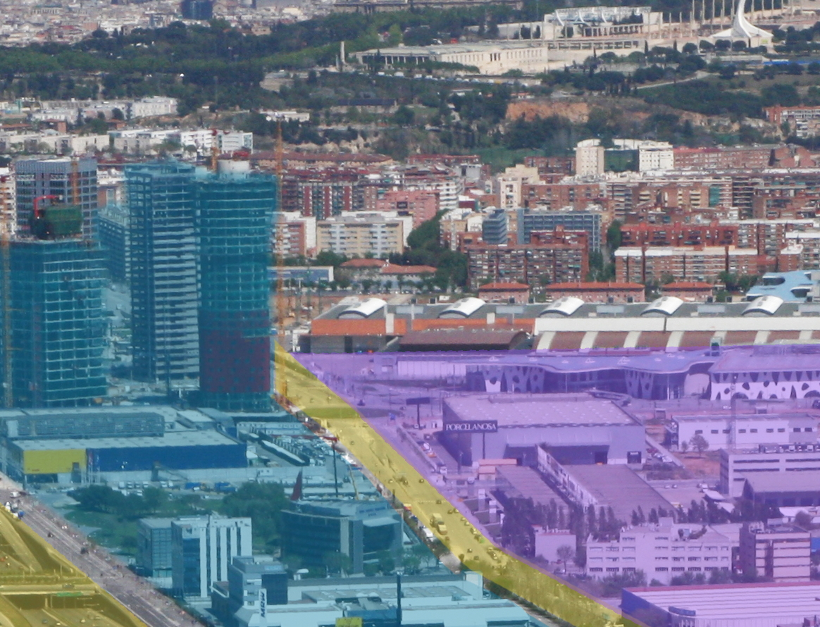 Imatge aèria del projecte Consorci Biopol de L'Hospitalet de Llobregat a la Gran Via. Detall amb àrees a prop de Gran Via L'H, amb Barcelona en el fons.